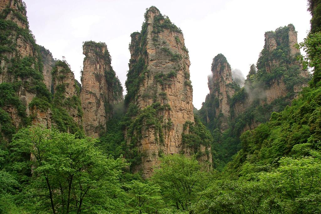 Foto: Tor Svensson